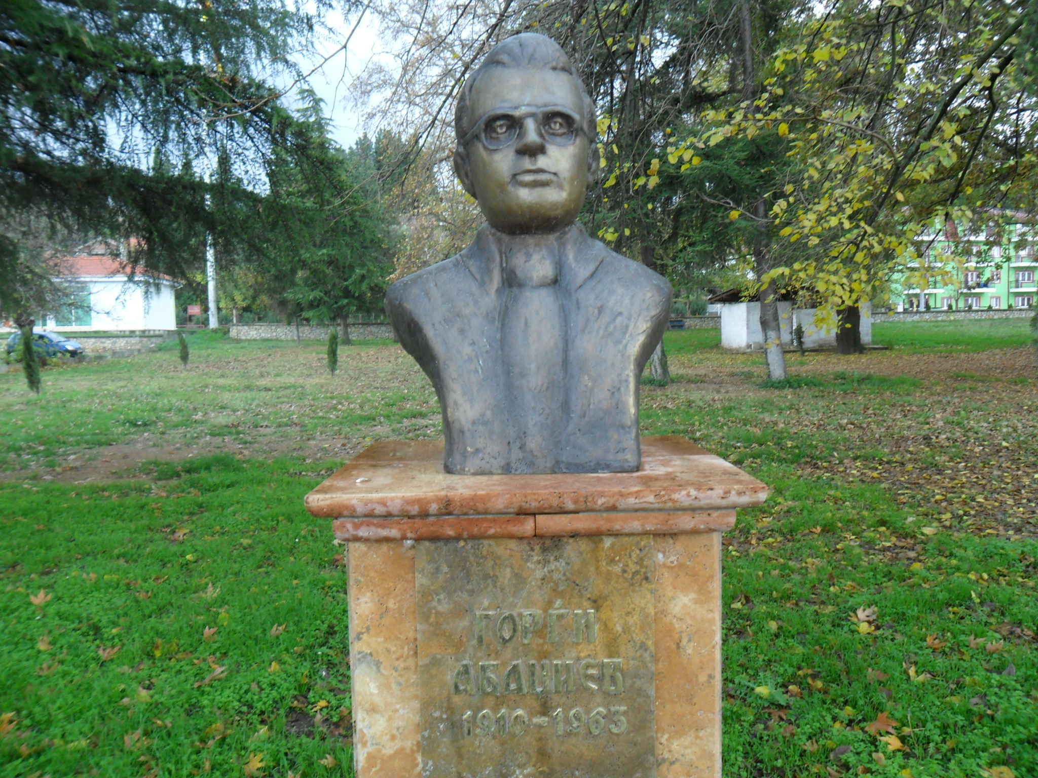 Бюст-паметник на писателя Георги Абаджиев